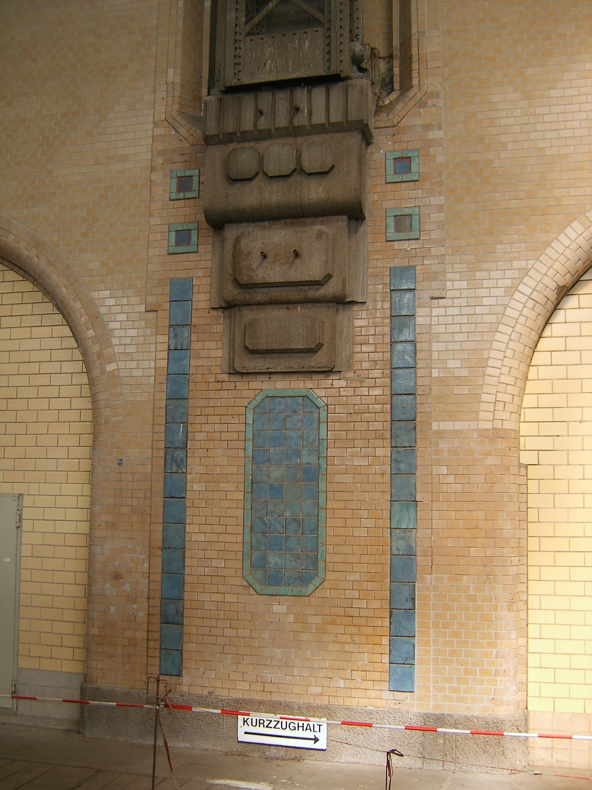 Hamburg, Hauptbahnhof, Detail innen.